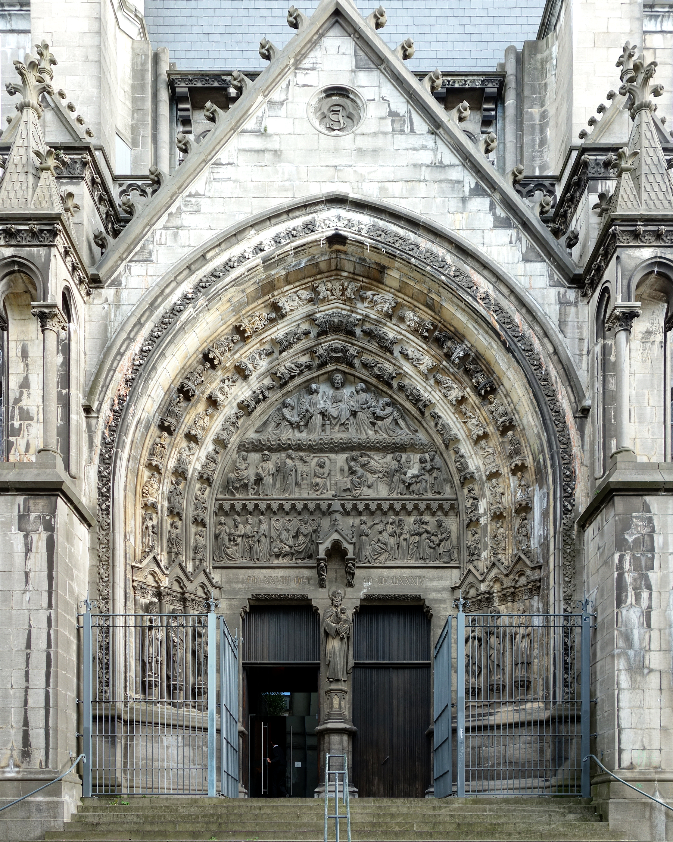 Le portail du bras nord du transept de la cathédrale Notre-Dame de la Treille à Lille. .